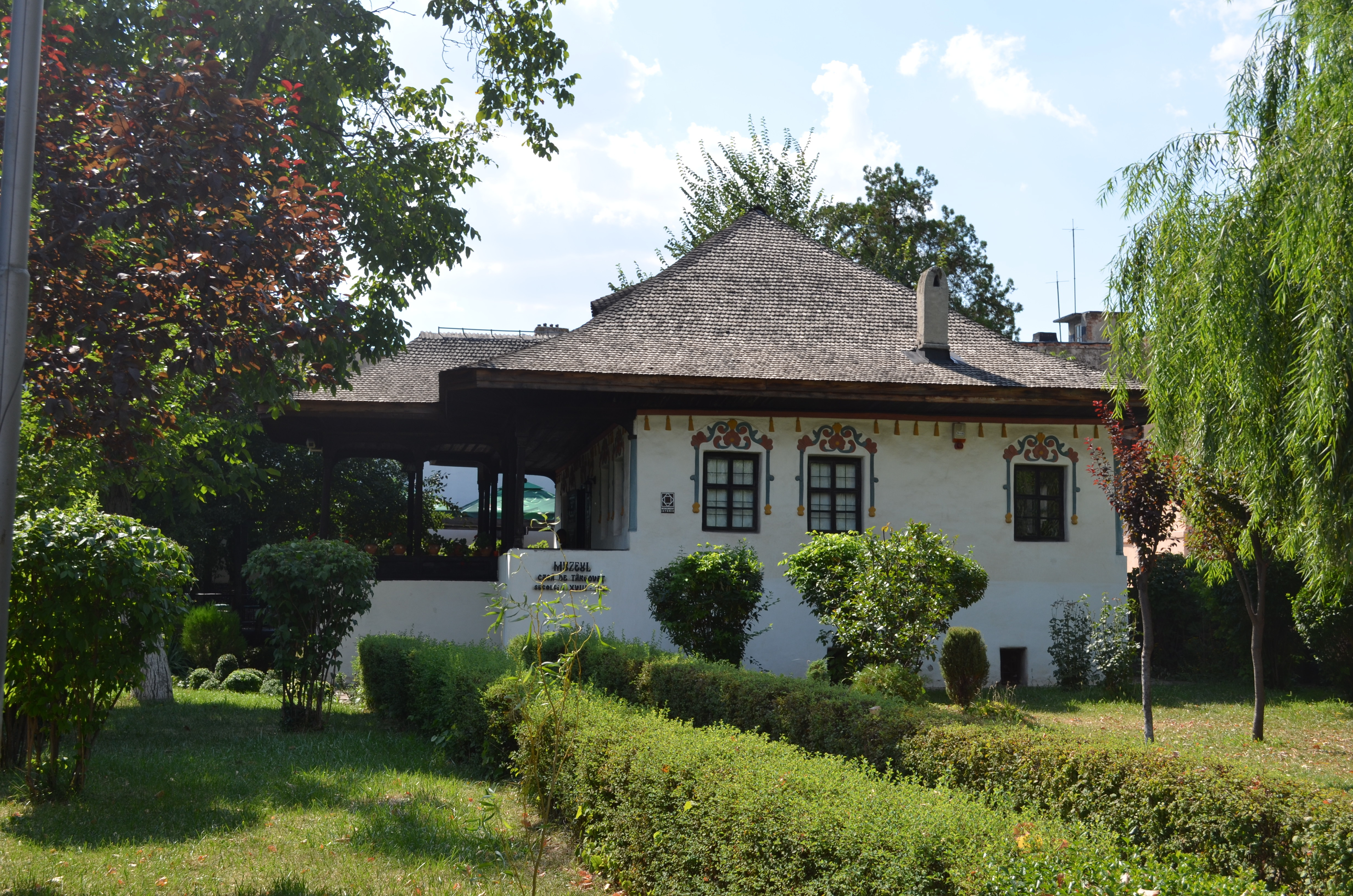 Muzeul "Casa de Târgoveț din secolul al XVIII-lea - al XIX-lea", Ploiești